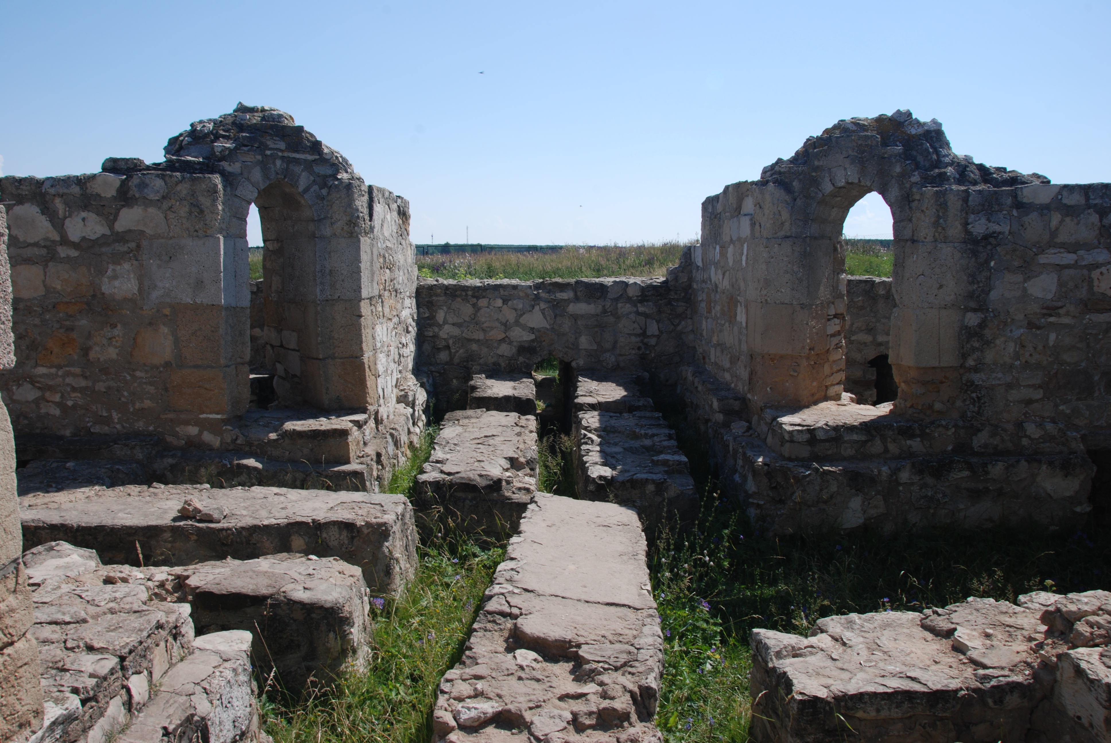 Комплекс памятников архитектуры XIII-XIV вв. на территории Булгарского городища (архитектурный комплекс «Болгары») (Республика Татарстан, Болгар, село Болгары, городище)